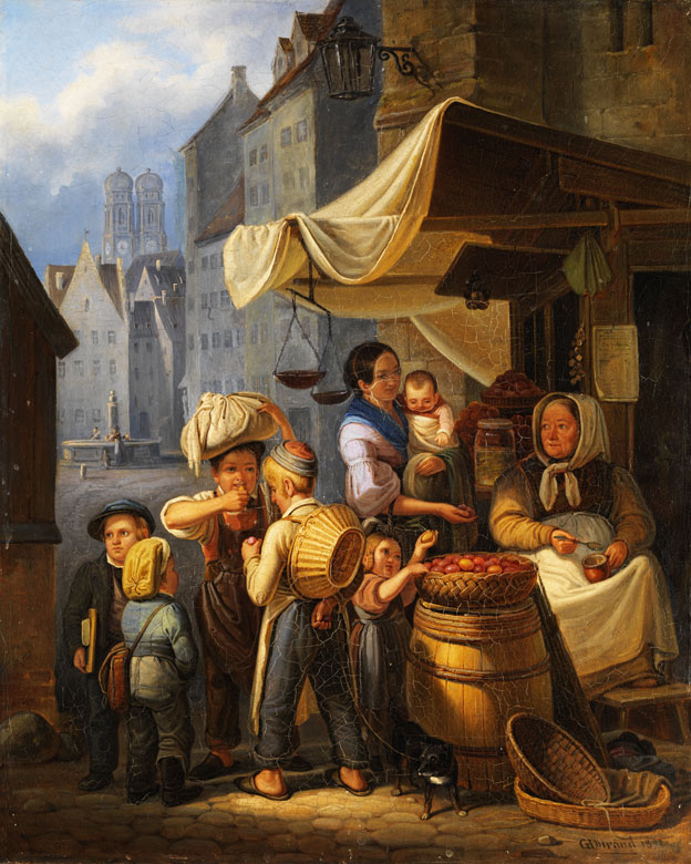 Das von dem 1811 in Hannover geborenen Genremaler geschaffene, signierte und 1842 datierte, von der Hampel Fine Art Auctions GmbH & Co KG als „Marktszene in München“ betitelte Gemälde in Öl auf Holz in den Maßen 42 x 34cm ...